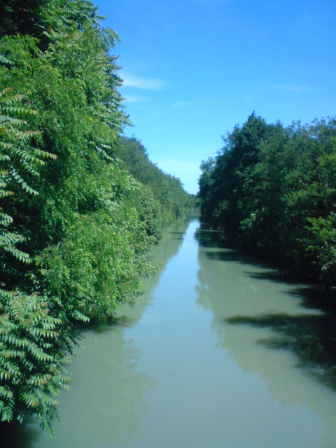 Canal latéral de Garonne à Brax (47 Lot-et-Garonne)